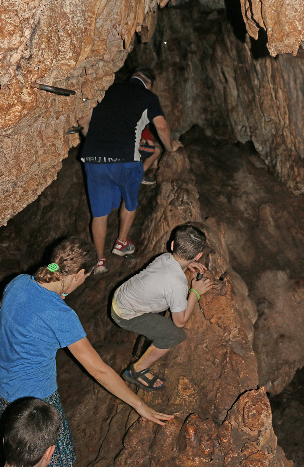 מערת שרך בנחל בצת